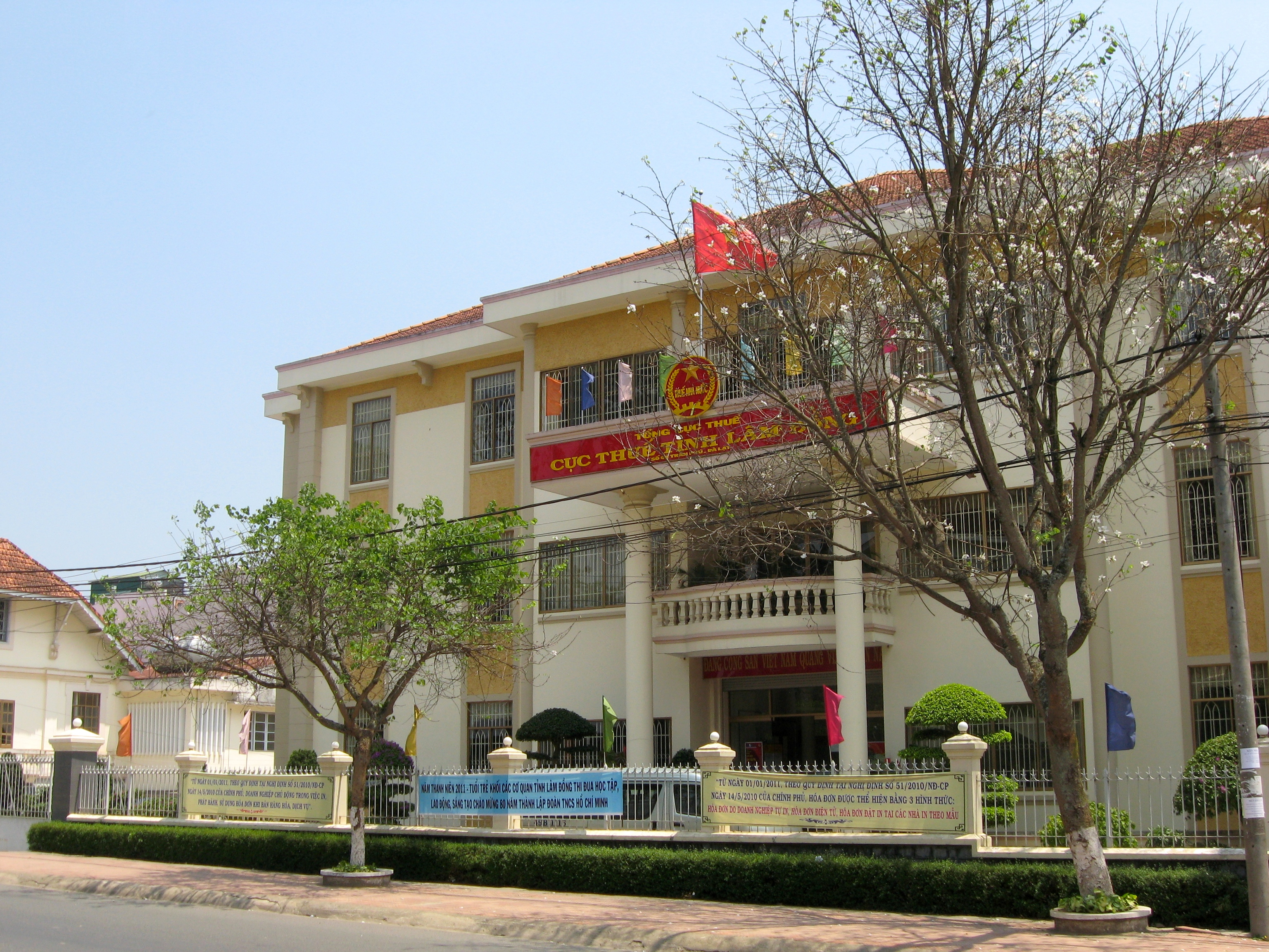 Cuc thue tinh Lam Dong